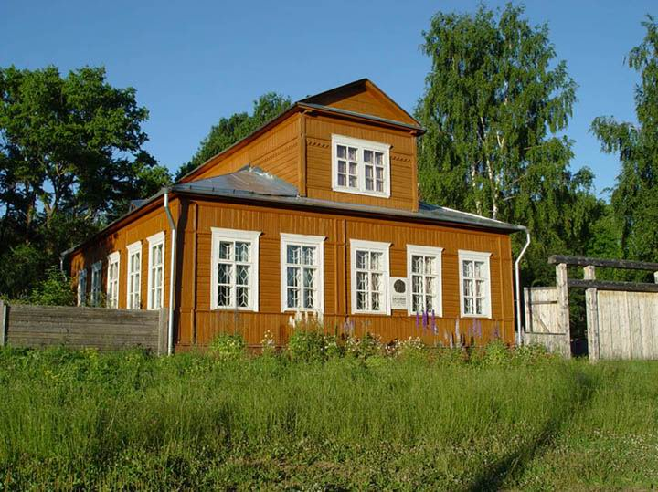 Музей-усадьба художников В.М. и А.М. Васнецовых в с. Рябово (филиал Вятского художественного музея).